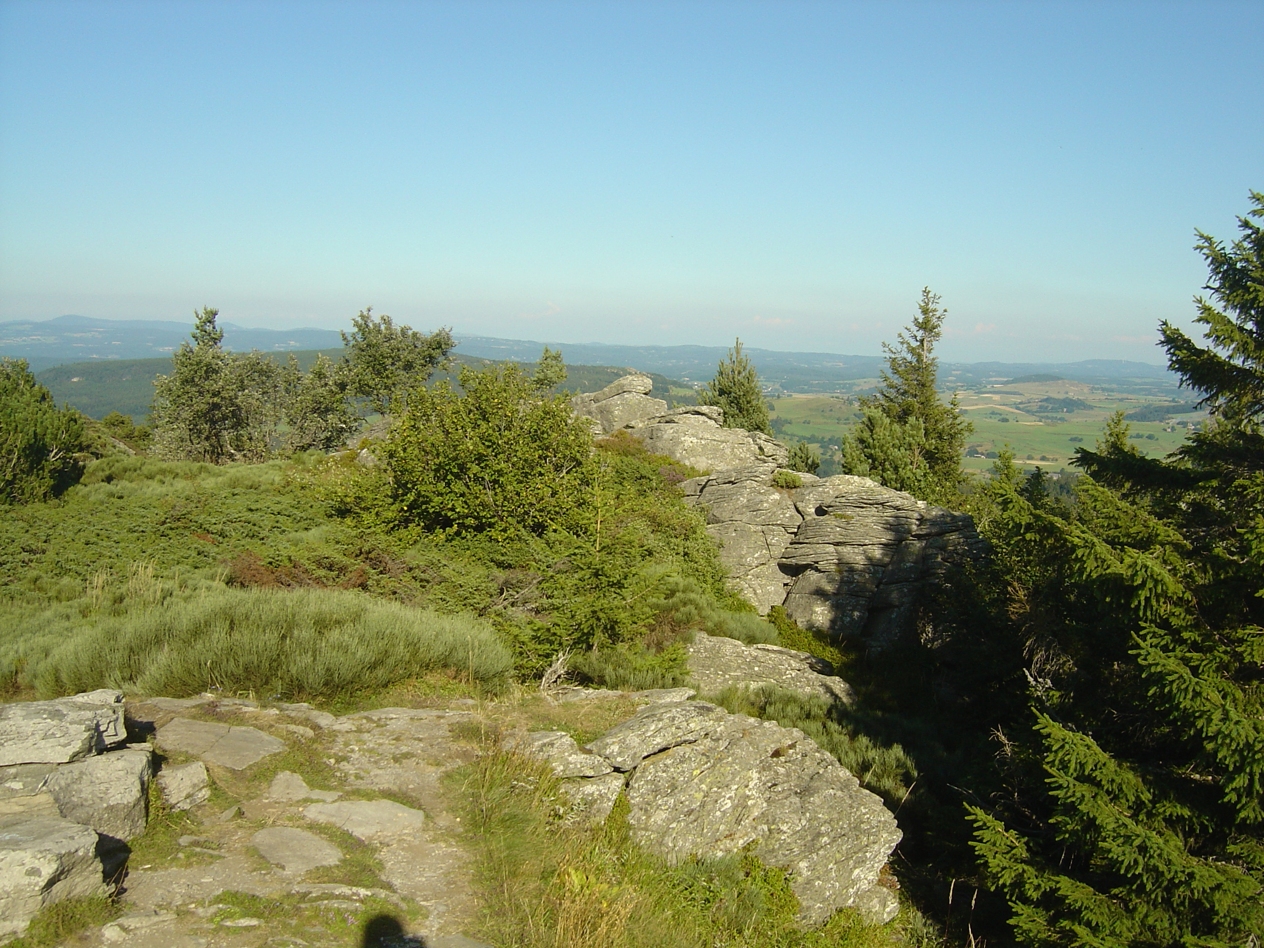 Au sommet du Grand Testavoyre (1436m), point culminant du massif du Meygal